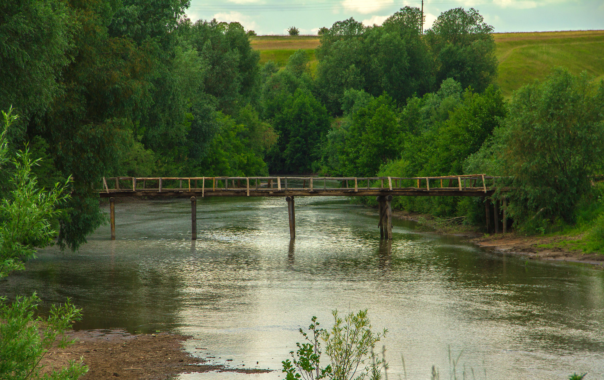 Деревянный мост через Большой Цивиль южнее Янмурзина